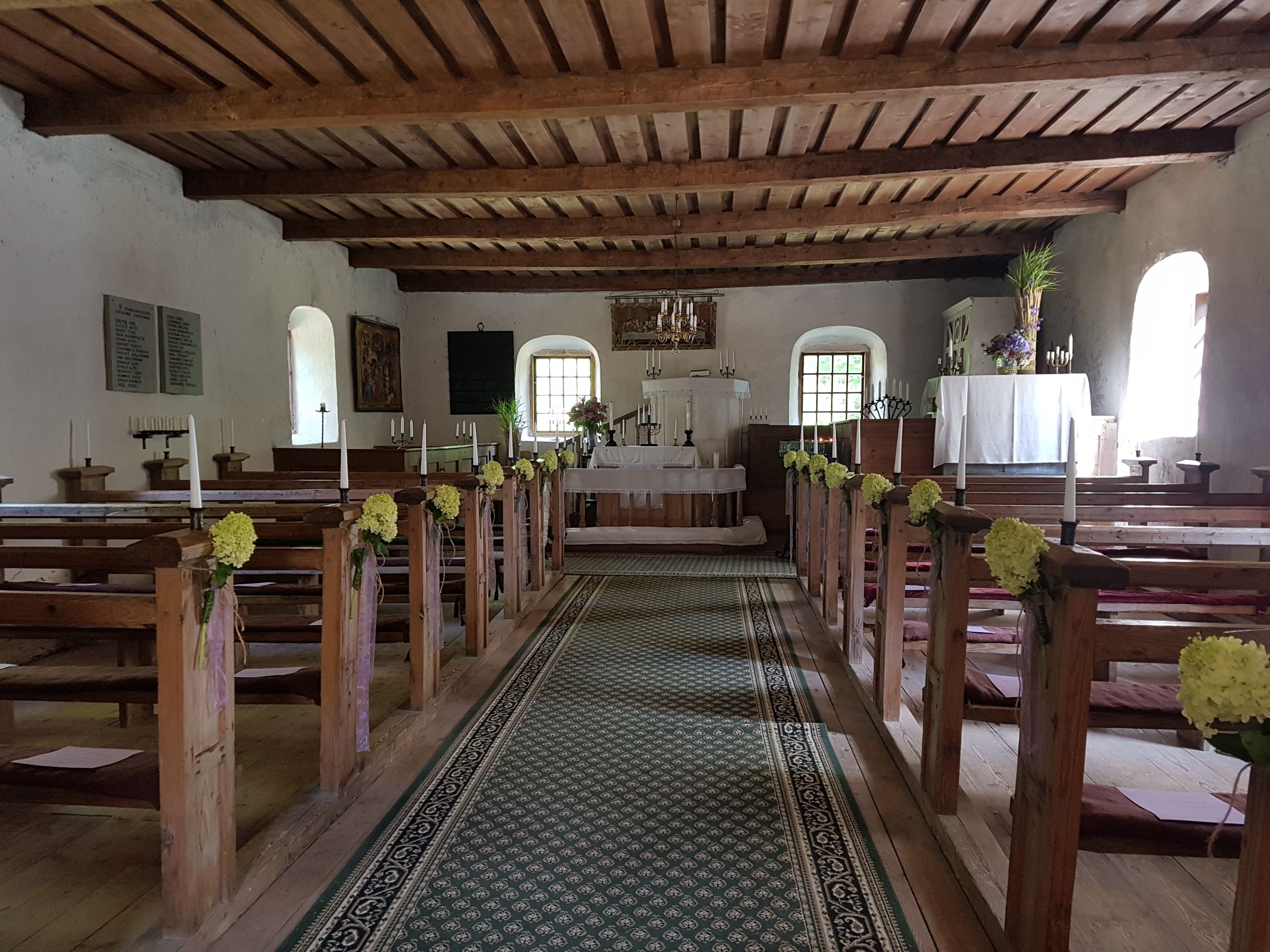 Kassari kabeli sisevaade pinkide ning taamal paistva altariga.